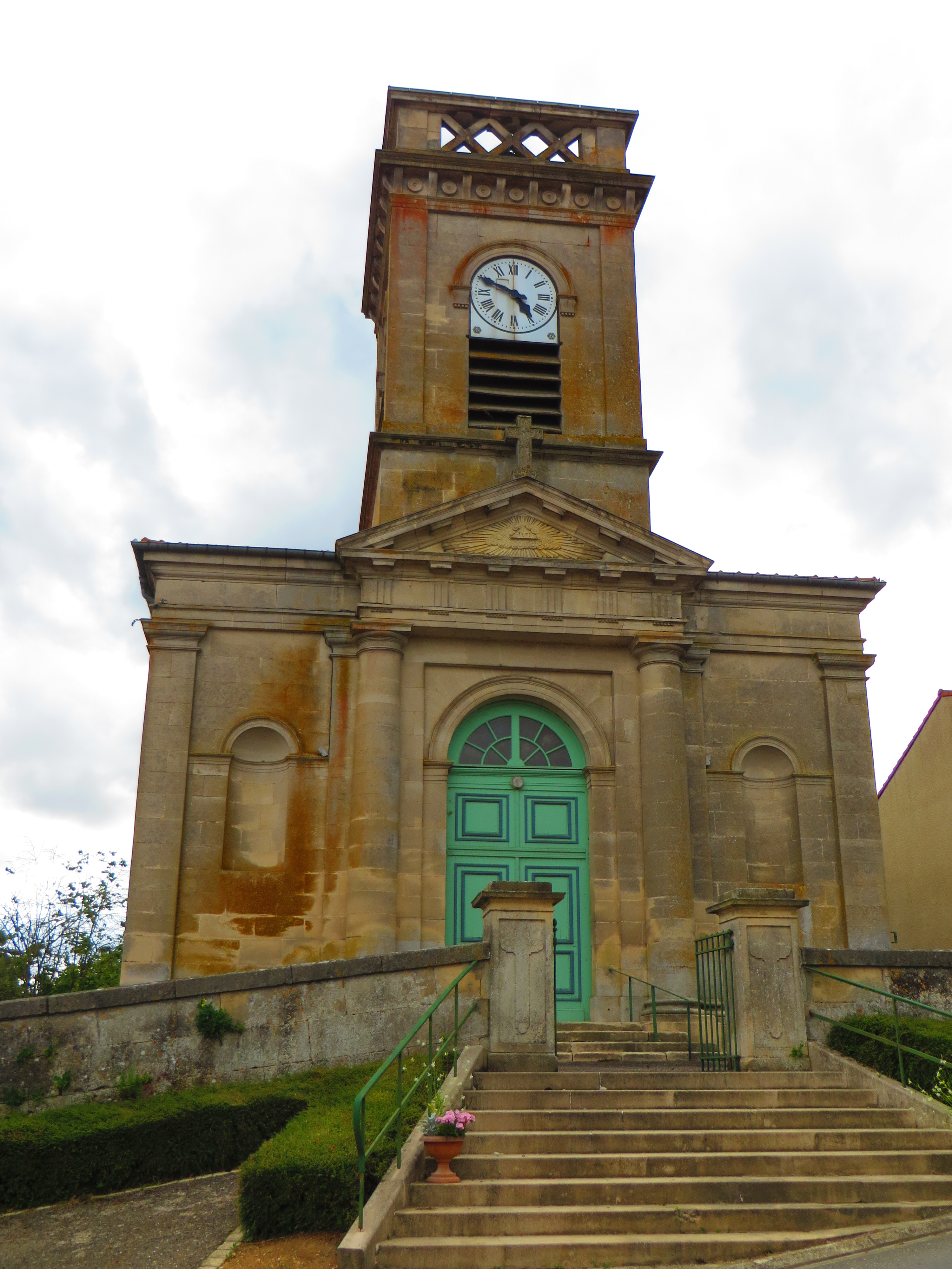 Récourt-le-Creux L'église Saint-Maurice